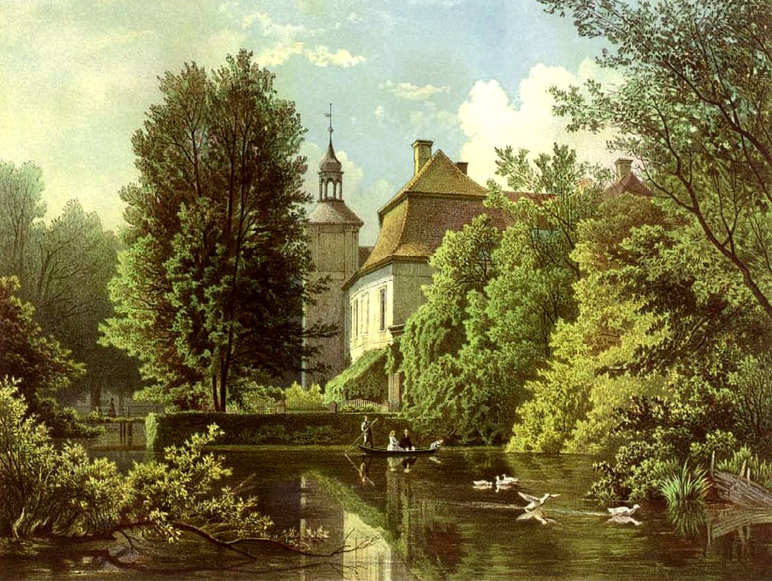 Schloss Vorhaus, Kreis Goldberg-Haynau, Provinz Schlesien